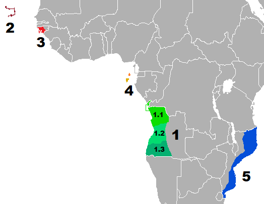 Dialectos del idioma portugués en África.